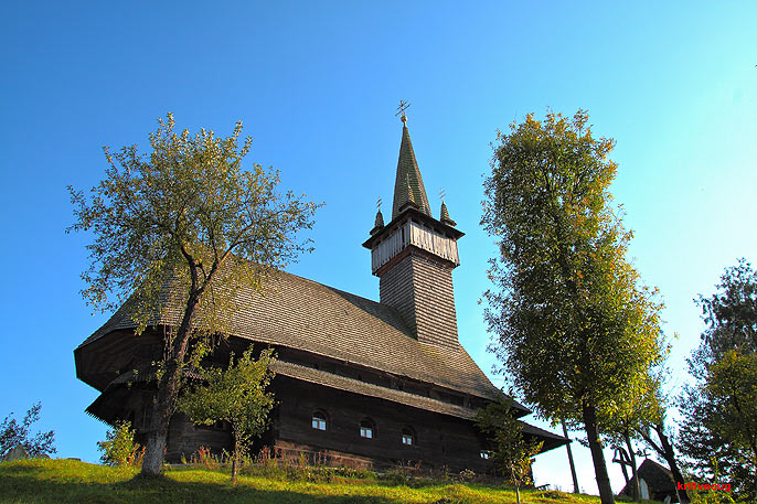 Дерев'яна церква в селі Нижня Апша. Тячівського району. Храм Святого Миколи Чудотворця 1604 рік